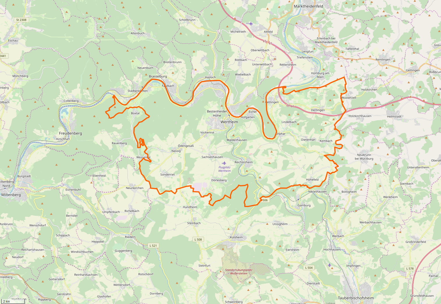 Gemarkung und Lage der Stadt Wertheim. Siehe auch: Liste der Kulturdenkmale in Wertheim. Gemarkungen und Lagen der Städte und sonstigen Gemeinden im Main-Tauber-Kreis: Ahorn · Assamstadt · Bad Mergentheim · Boxberg · Creglingen · Freudenberg · Großrinderfeld · Grünsfeld · Igersheim · Königheim · Külsheim · Lauda-Königshofen · Niederstetten · Tauberbischofsheim · Weikersheim · Werbach · Wertheim · Wittighausen